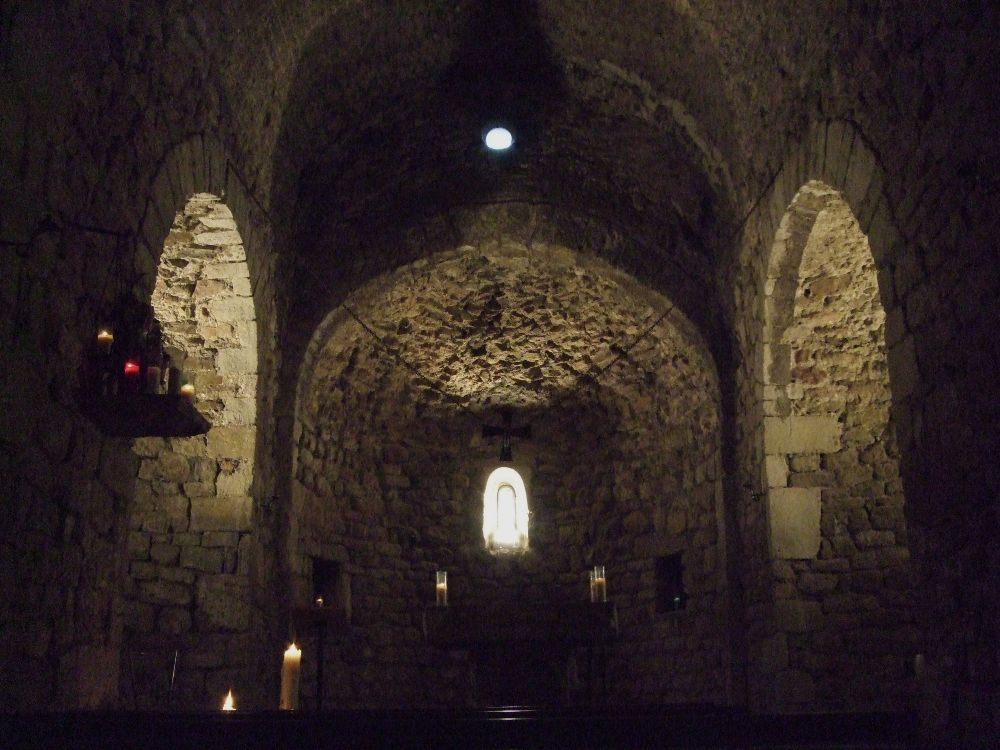 Interior de l'Ermita de la Salut de Valldoreix, el dia de l'Aplec de la Salut d'aquest poble.